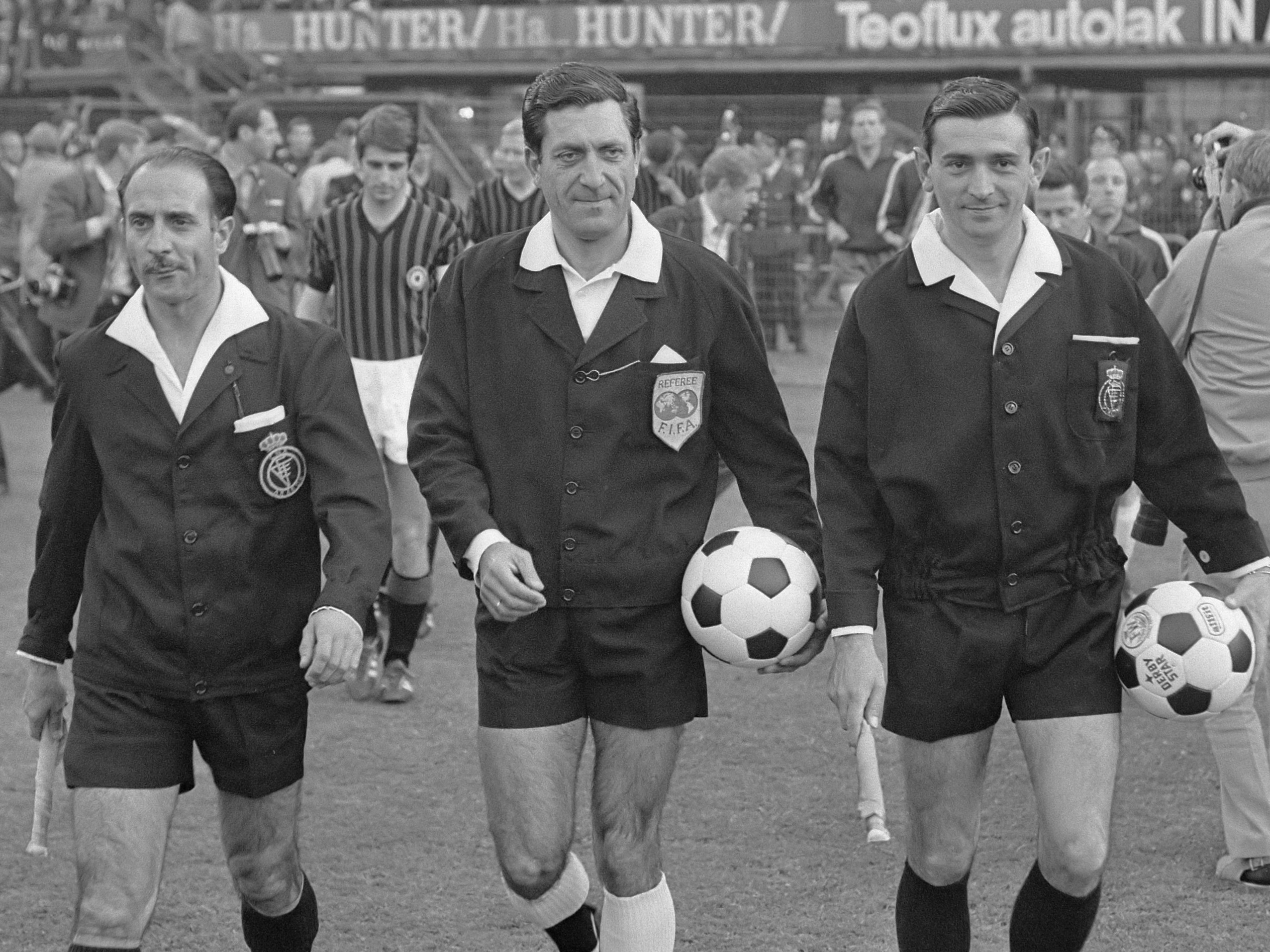 Finale Europa Cup II AC Milan tegen HSV Hamburg 2-0 Nummers 5.6 Scheidsrechter Jose Maria Ortiz (Portugal) met grensrechters 23 mei 1968